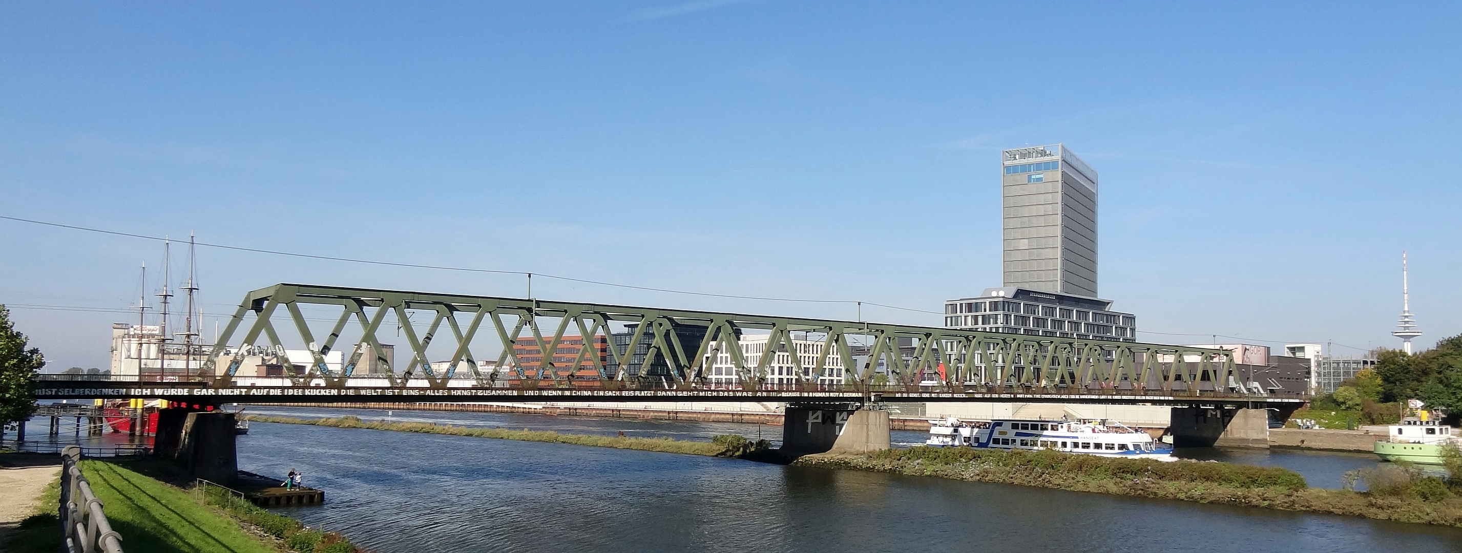 Eisenbahnbrücke in Bremen. Auf dem Wasser, unter der Brücke: Fahrgastschiff "Hanseat".